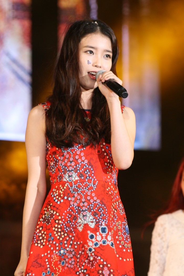 2012년 7월 3일 여수 엑스포 팝 페스티벌에서 아이유.